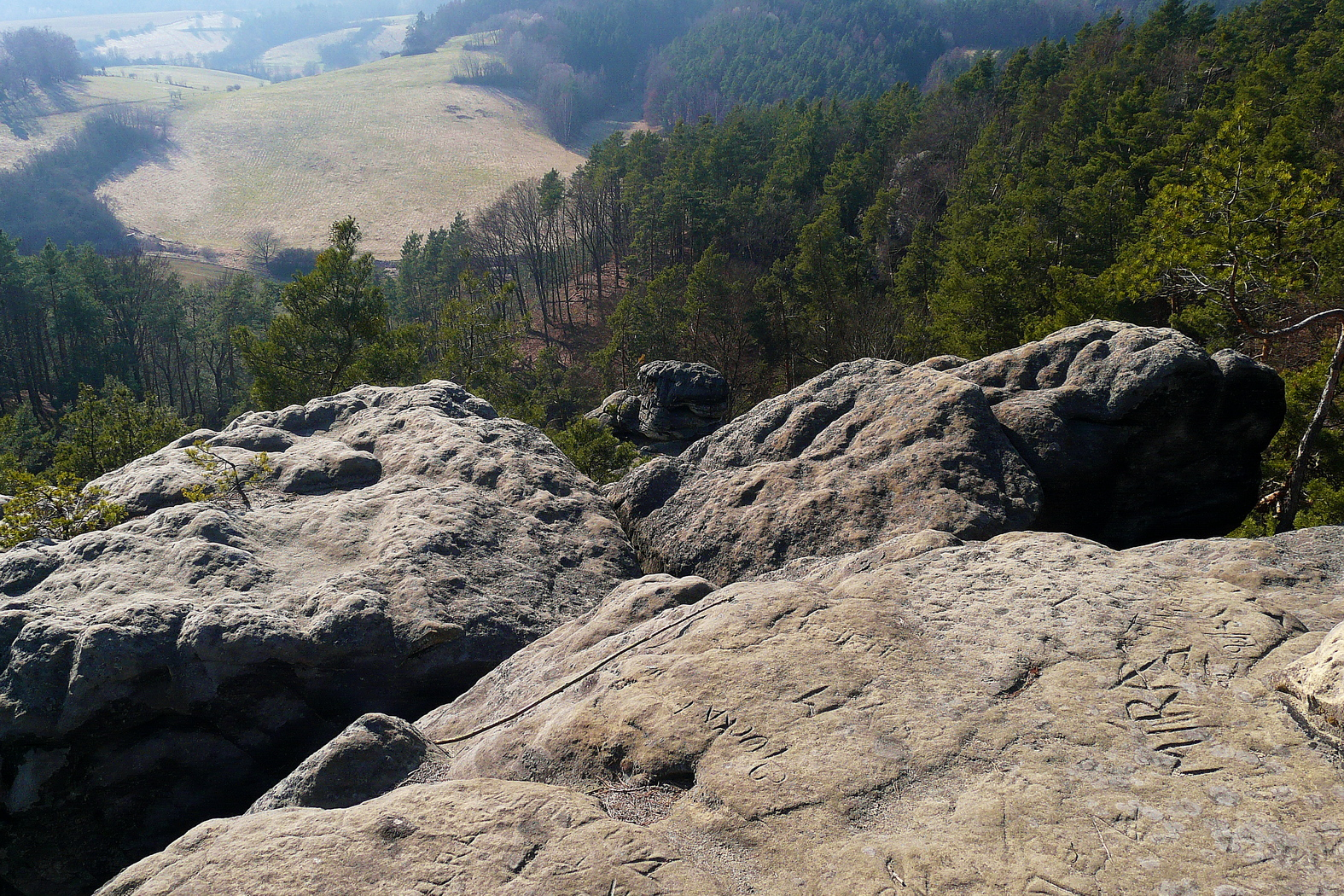 Vrcholové skály Vepřska